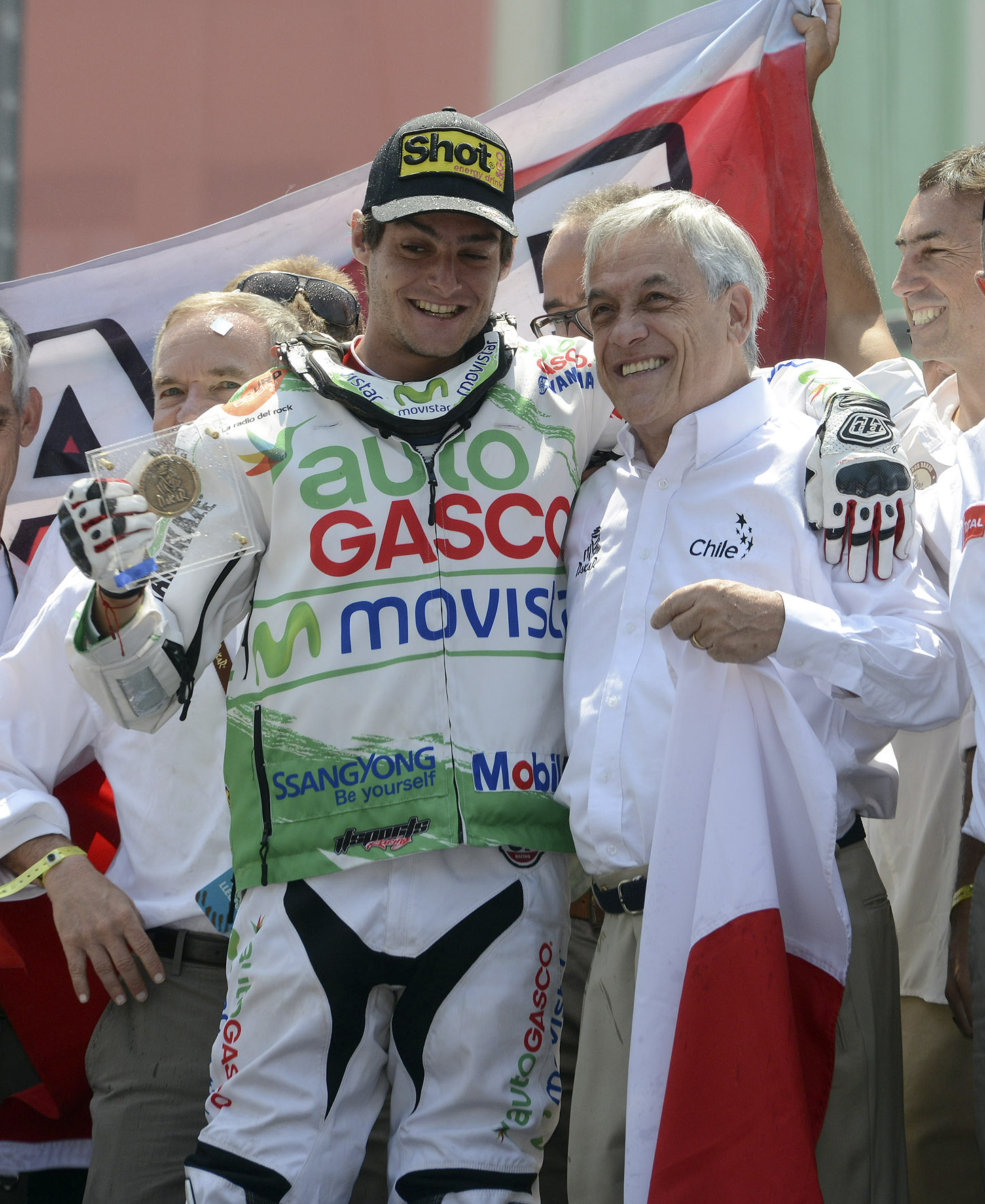 20-01-2013 Premiación del Rally Dakar 2013